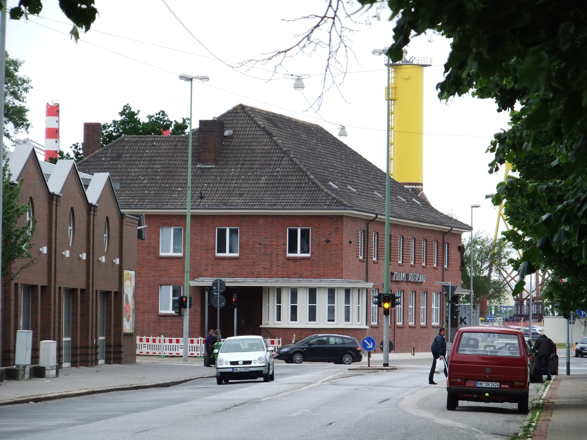 Zollamt Rotersand in Bremerhaven, Franziusstraße 1 .Das abgebildete Objekt ist ein geschütztes Kulturdenkmal in der Freien Hansestadt Bremen, mit der Nr. 3025 beim Landesamt für Denkmalpflege registriert.